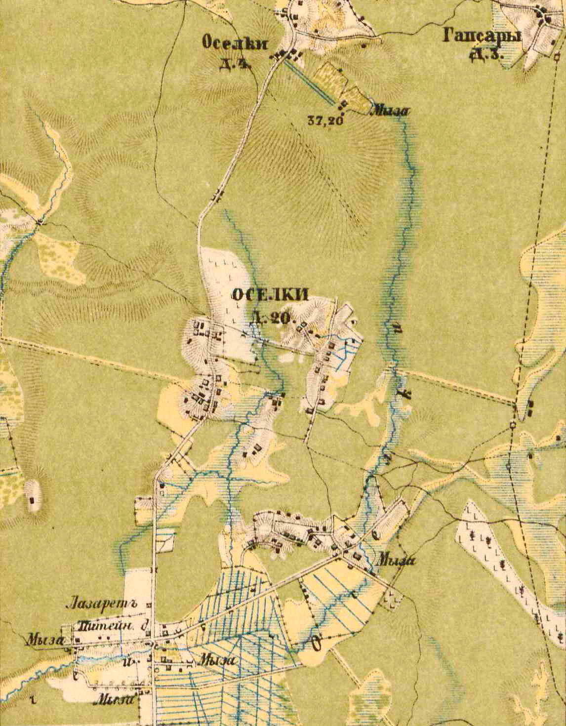 План деревень Осельки. 1885 г.